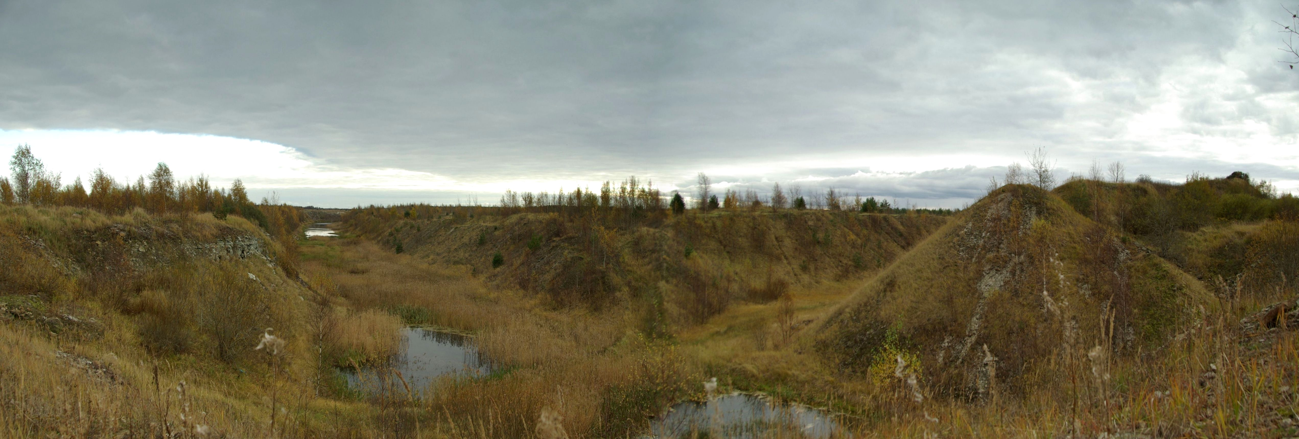 Maardu fosforiidikaevanduse kirdenurk Ülgase külas. Ülgase on küla Harjumaal Jõelähtme vallas. Küla asub tervikuna Rebala maastikukaitsealal.